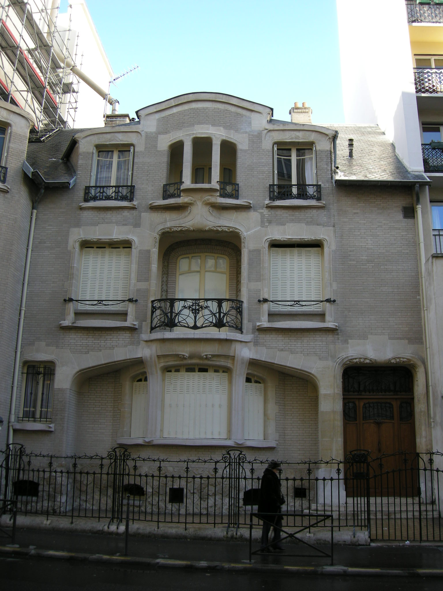 Hotel mezzara 1911